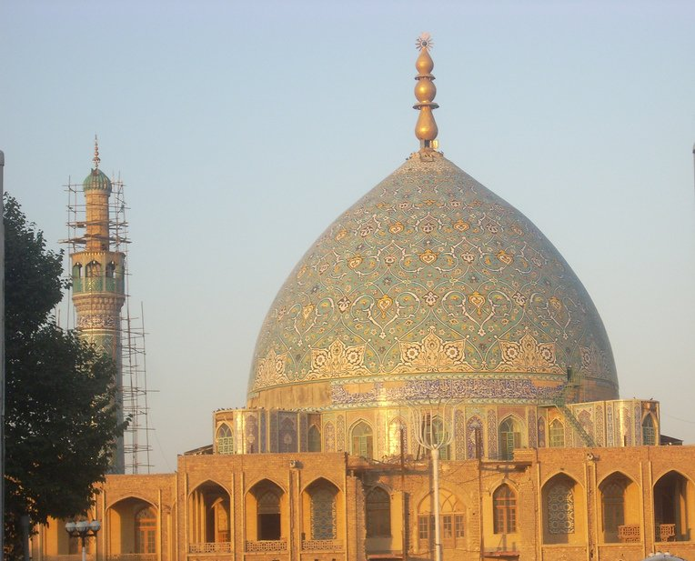 مقبره امازاده آقا علی عباس در بادرود کاشان